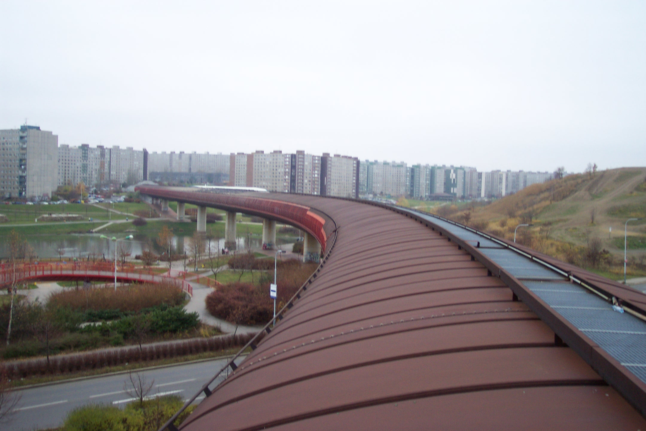 Prague metro bridge at Jihozápadní město, near Hůrka metro station - Most metra nedaleko stanice Hůrka na Jihozápadním městě.